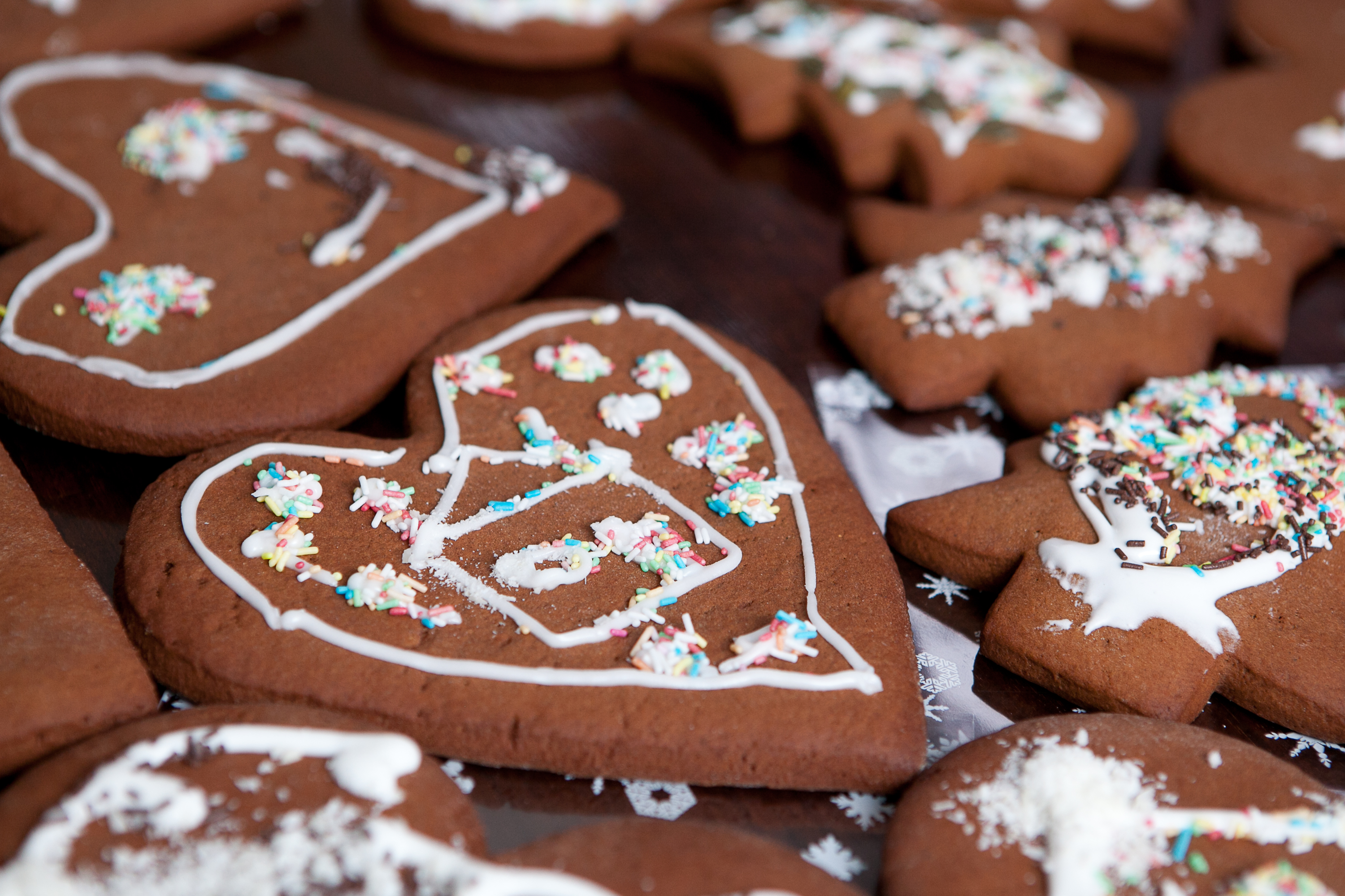 Gingerbread